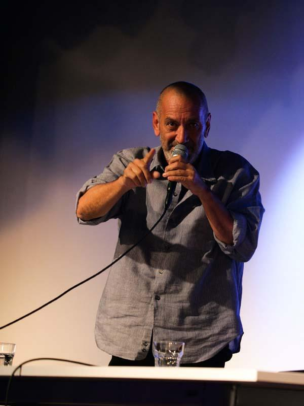 Nesta quarta, 28 de agosto, a ministra da Cultura, Marta Suplicy, deu posse a Guti Fraga como o novo presidente da Fundação Nacional de Artes – Funarte, na presença de diretores e funcionários da Instituição.